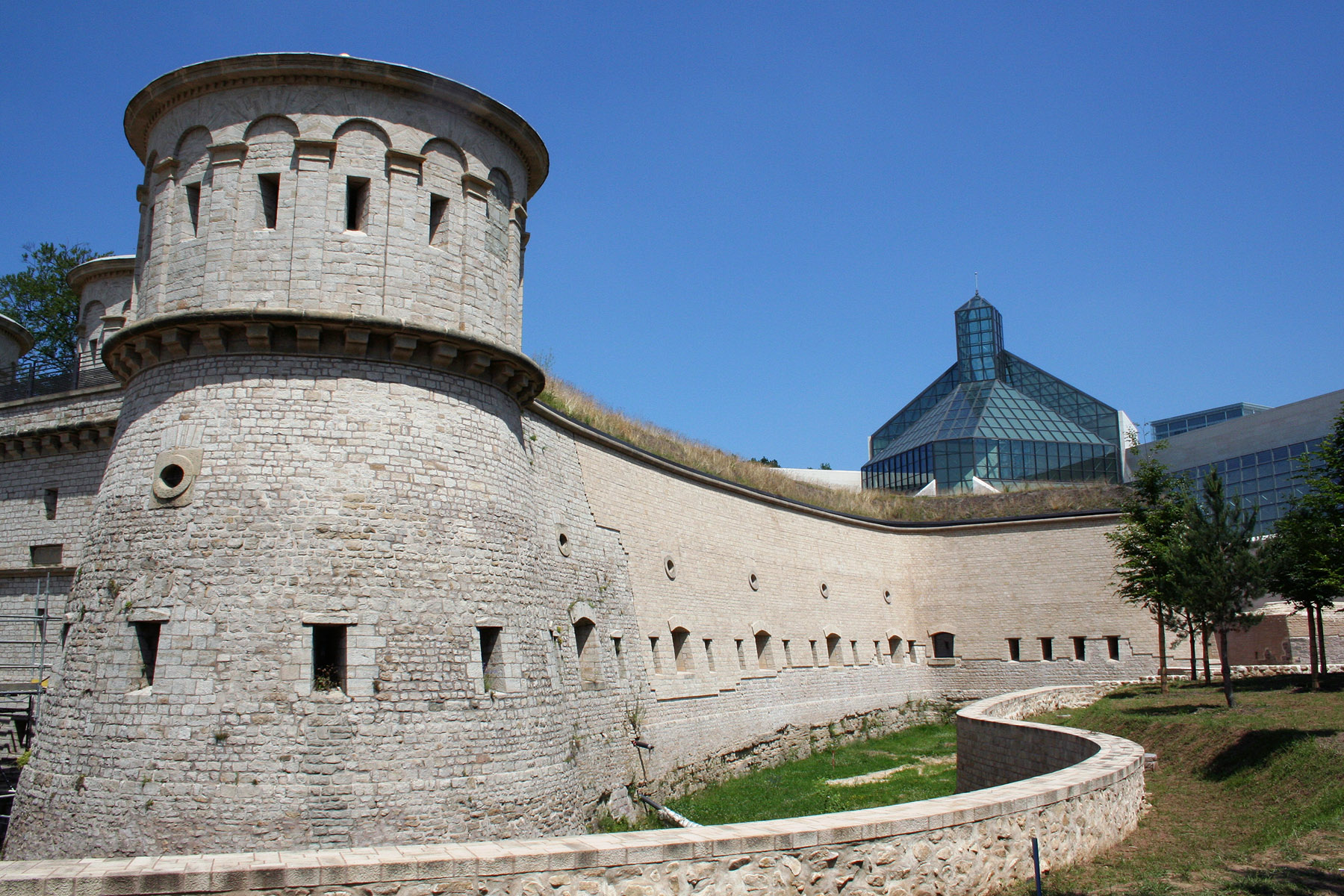 Left: Musée de la forteresse, Fort Thüngen. Right: MUDAM – Musée d'art moderne Grand-Duc Jean, Luxembourg.